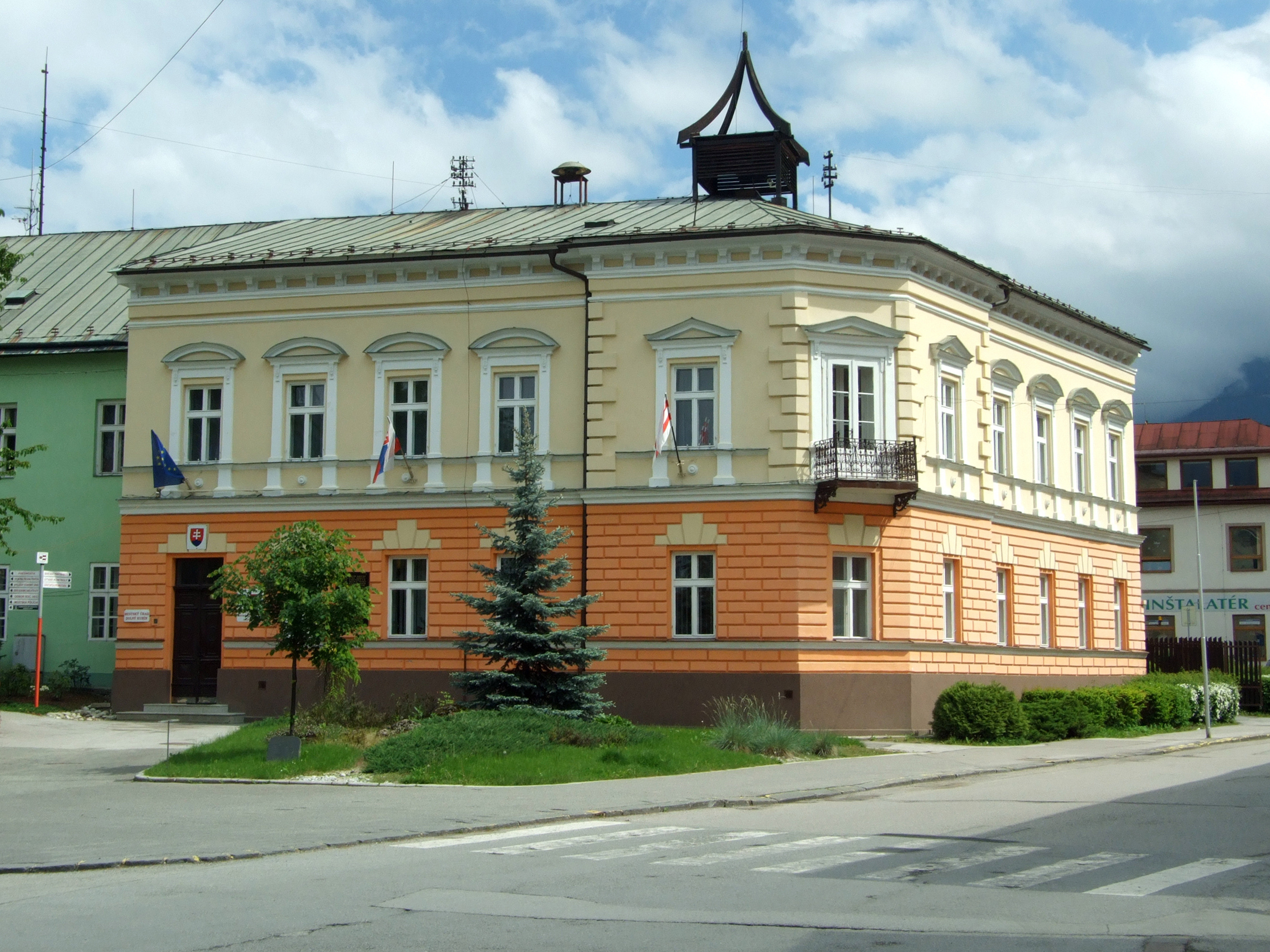 Bývalý bank, 1880